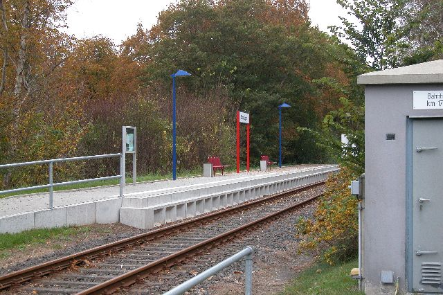 Bahnhof Süderlügum